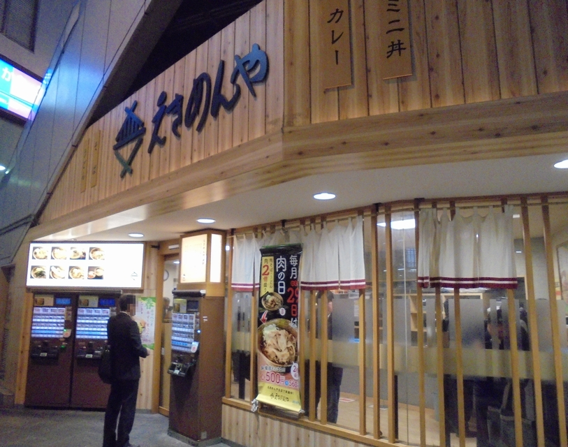 Ekimennya (Shinagawa_Station, Minato,_Tokyo, Japan)